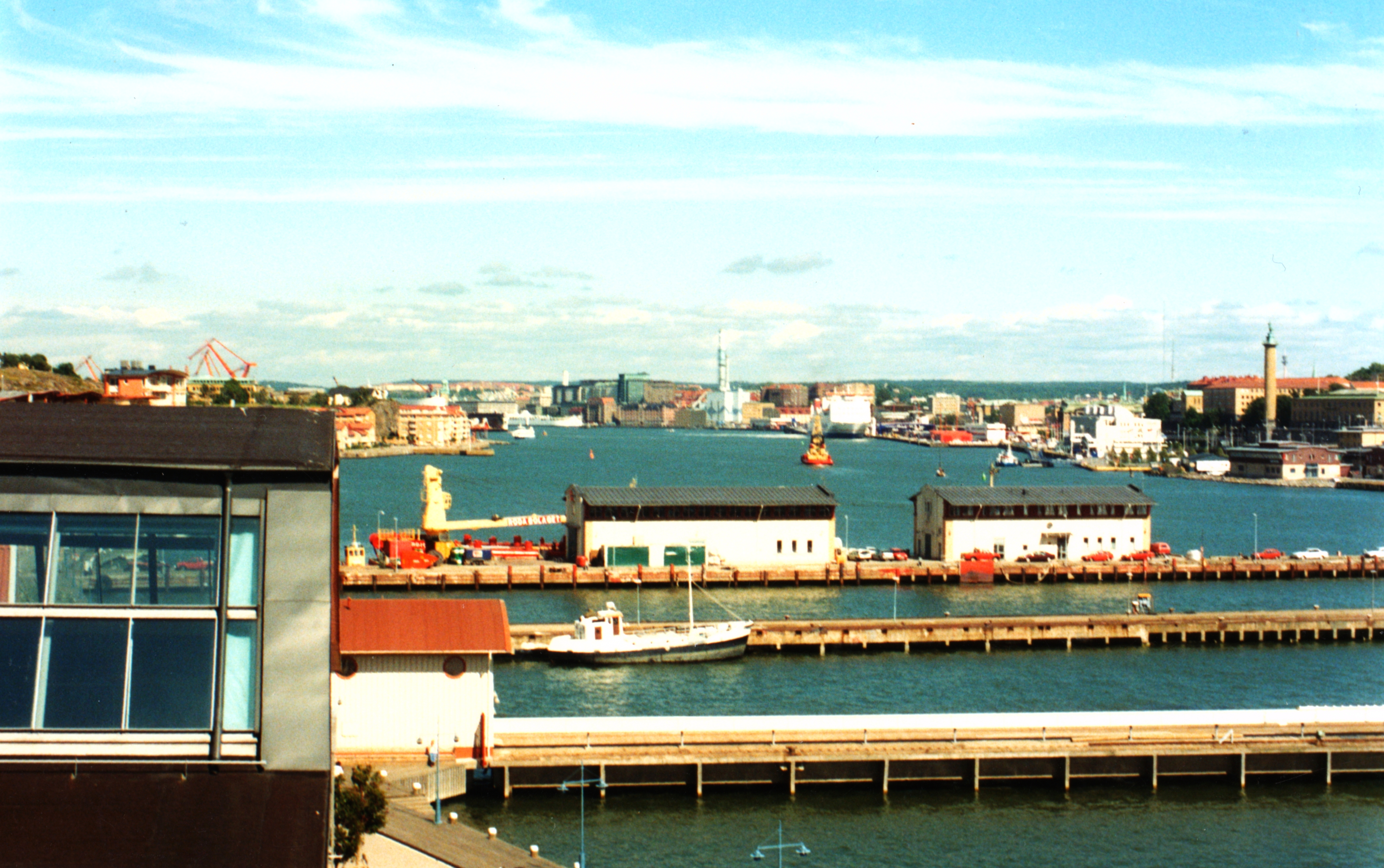 Göta älv från Eriksberg (2008)